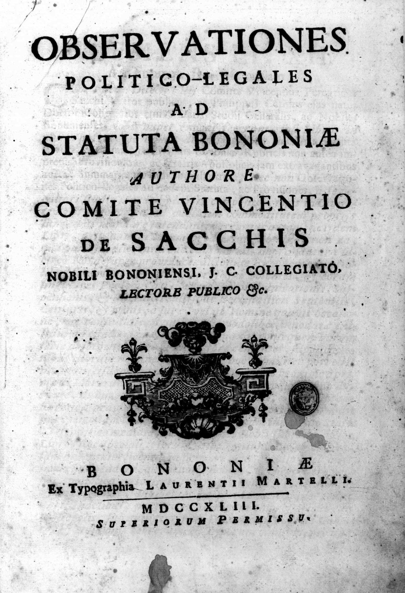 Frontespizio